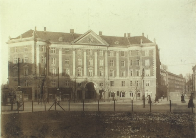 Ejendommen Sankt Thomas, Frederiksberg. Fotograferet kort efter opførelsen i 1905.